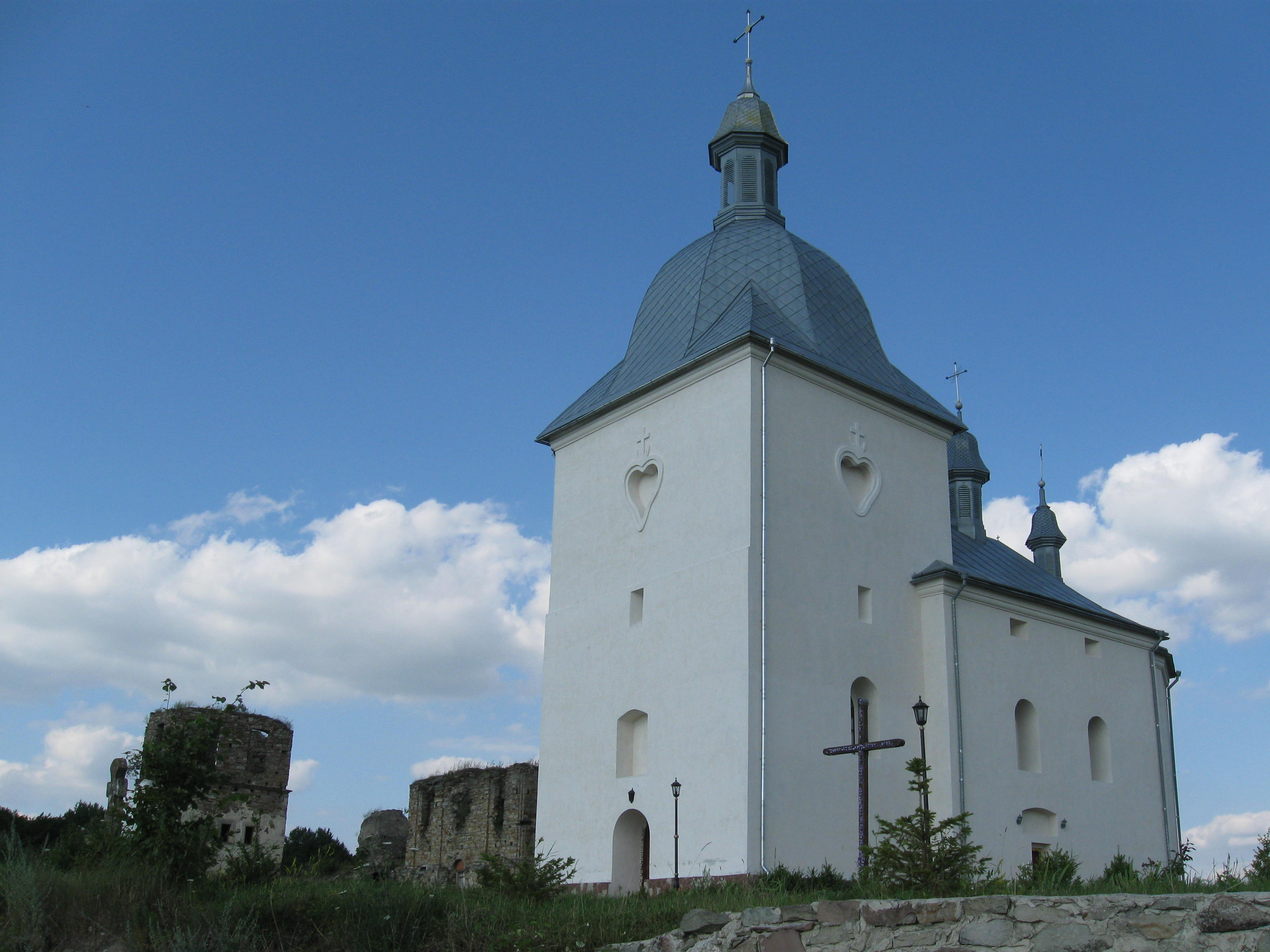 Церква колишнього Підгорянського монастиря (The Church of the former Pidhora Monastery)